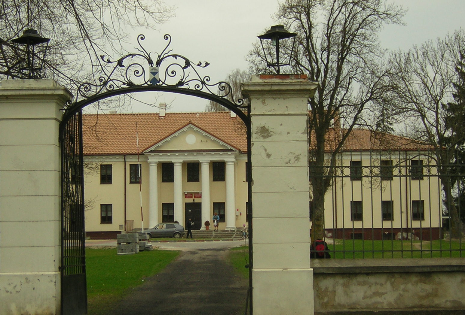 Rusków - klasycystyczny pałac Humnickich.